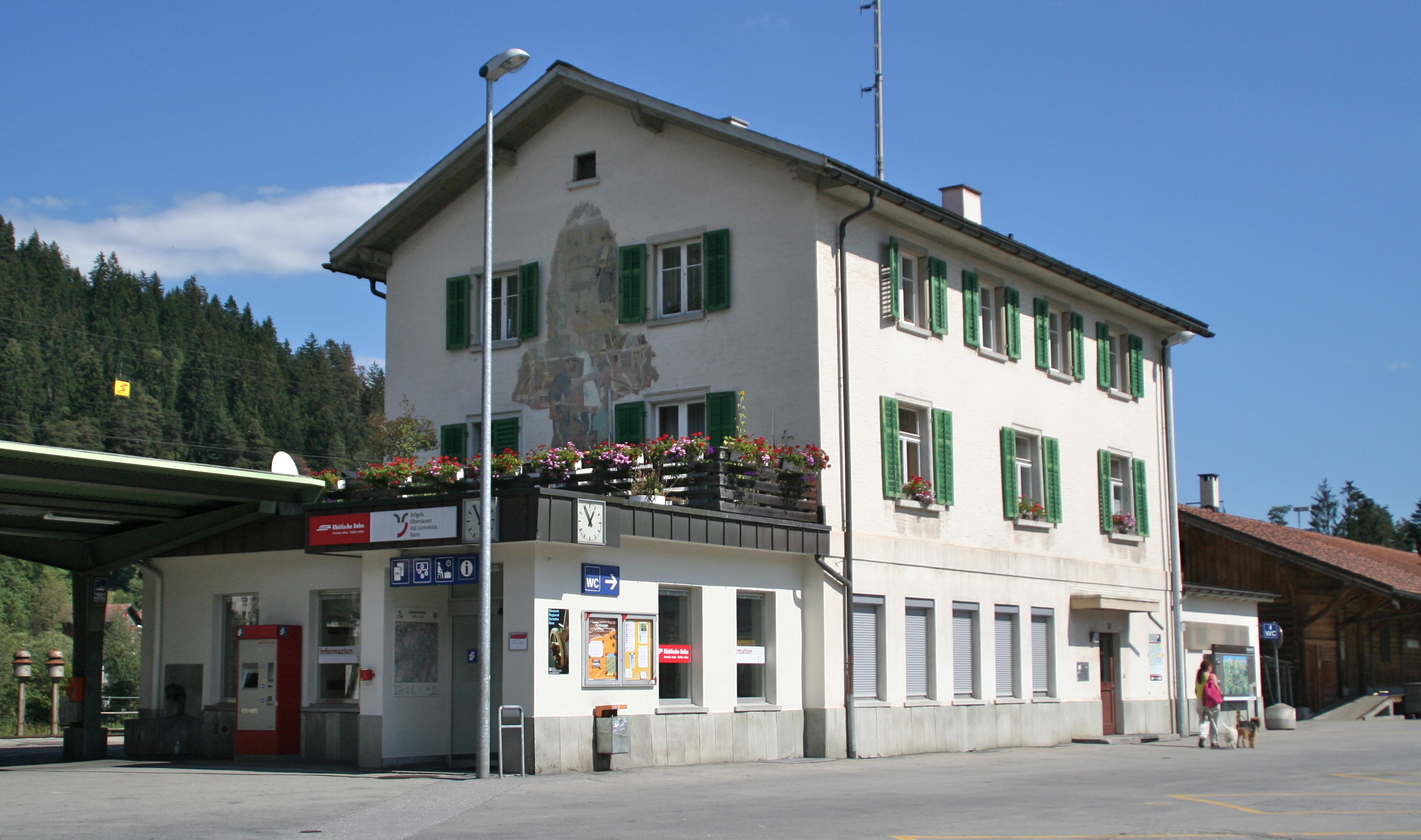 Bahnhof Ilanz